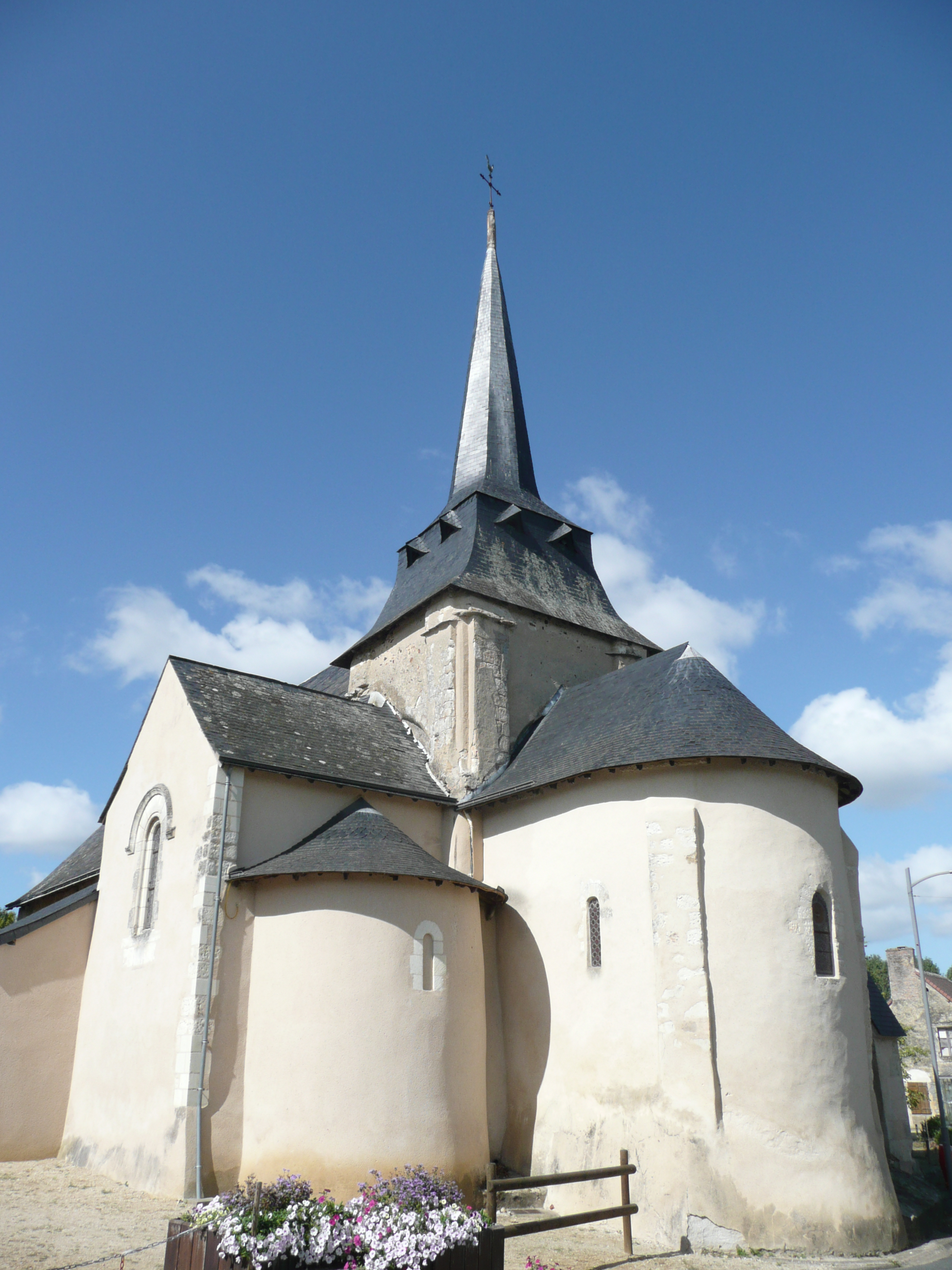 Saint-Quentin - Eglise .